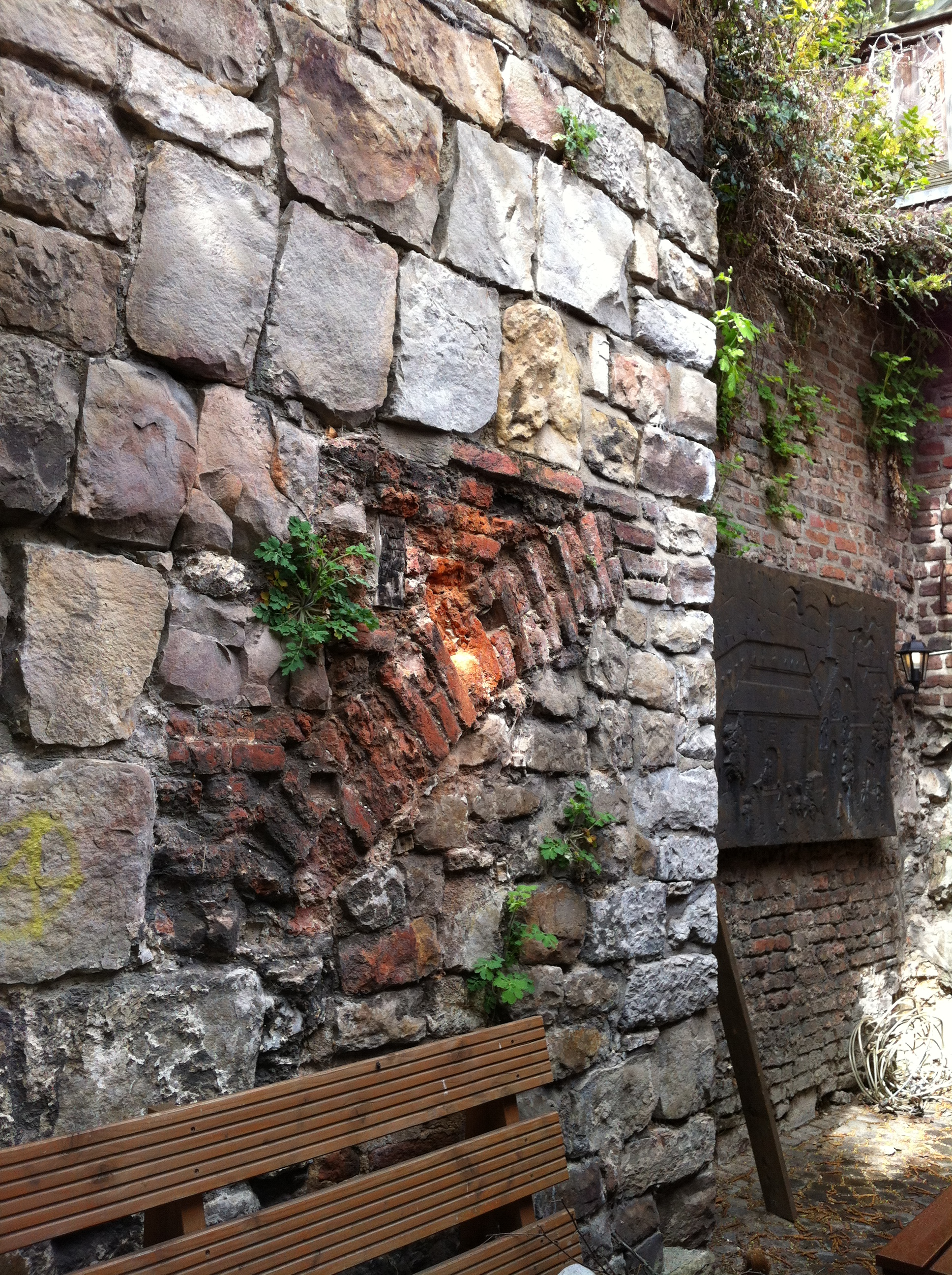 Mauerreste der Deutschordenskommende St. Aegidius in Aachen in der Barbarossamauer (innere Stadtmauer); im Hintergrund Bronzetafel mit einem Abbild der Kommende